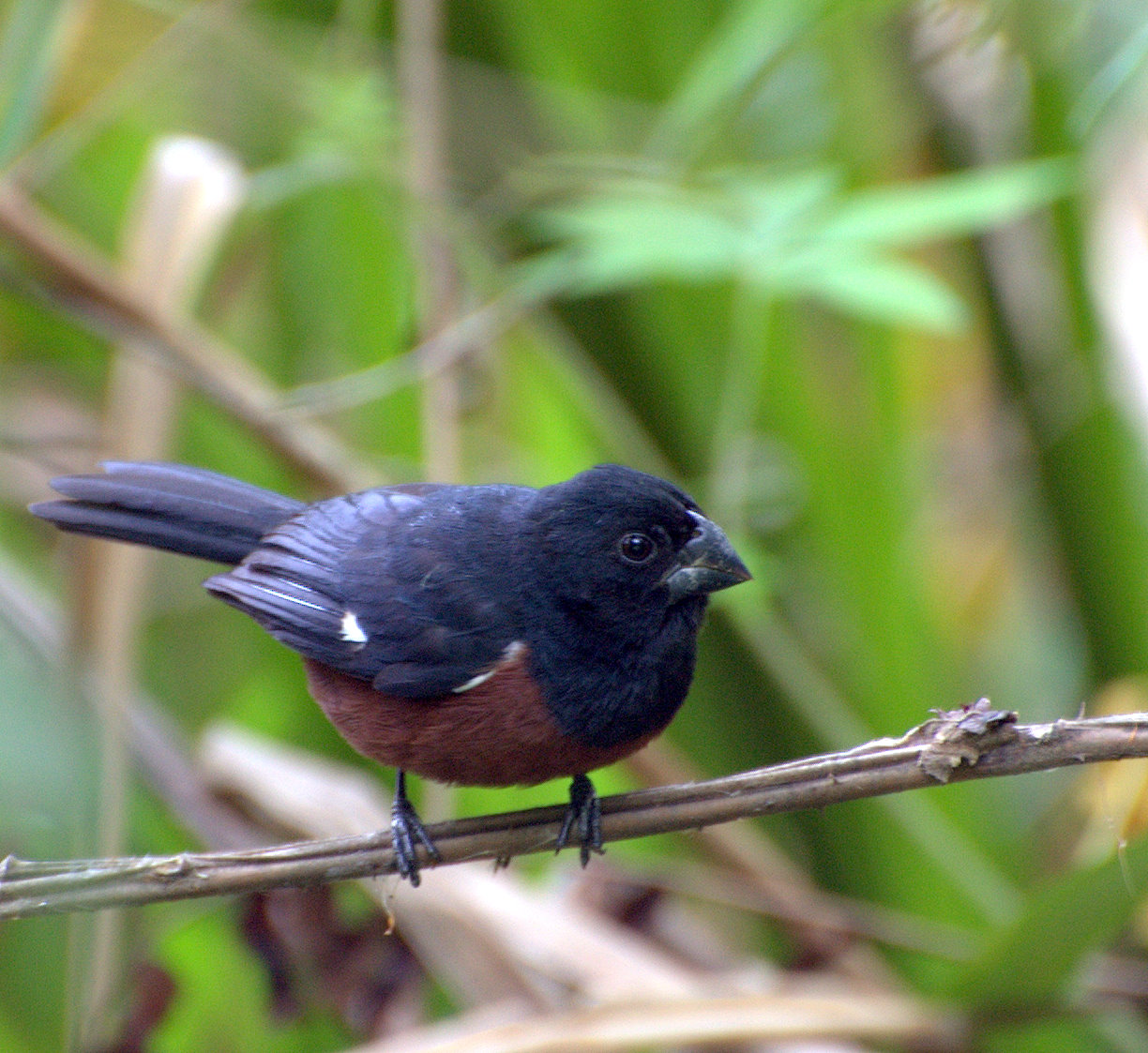 Oryzoborus angolensis do Jardim Botânico de São Paulo